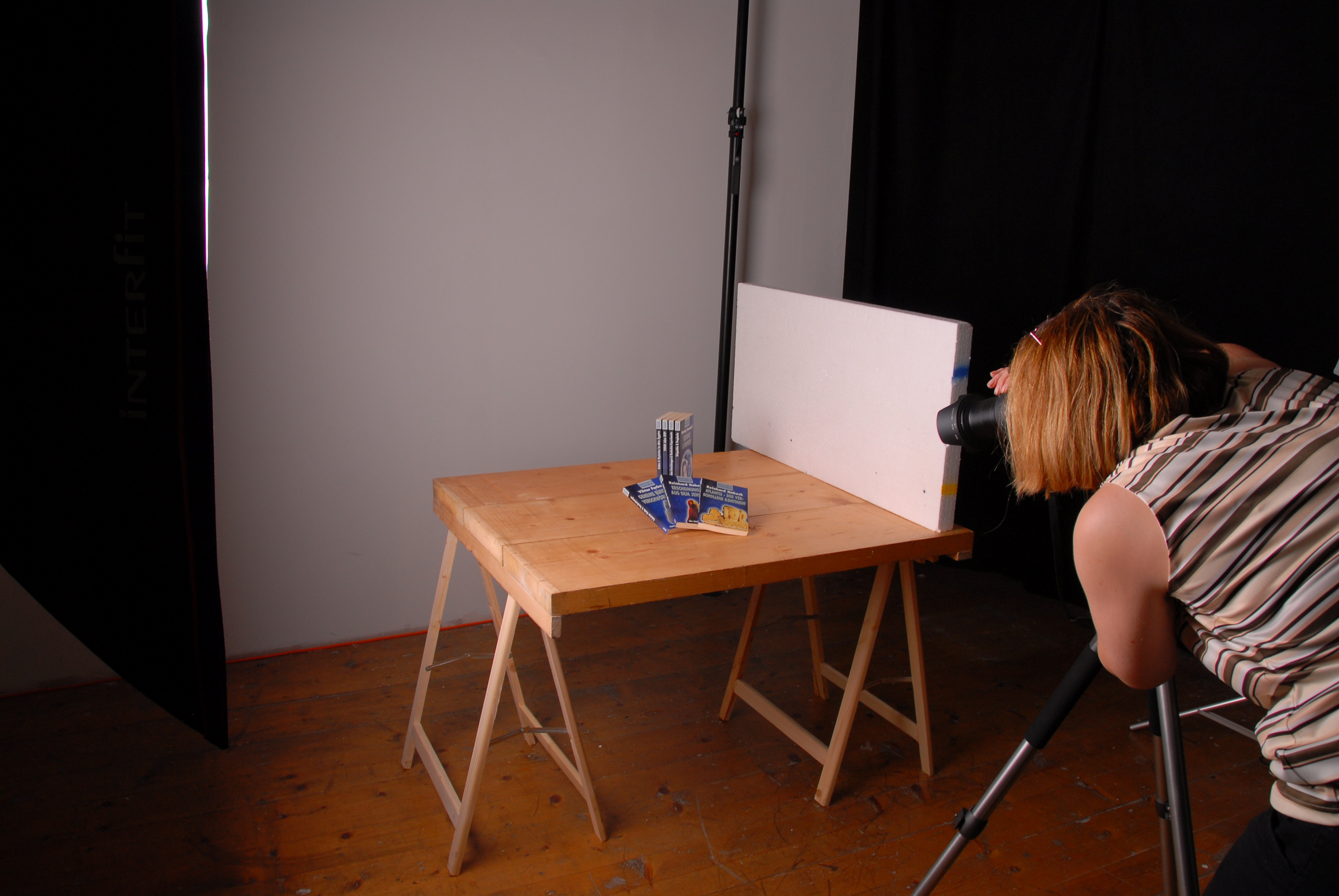 Produktfotografie